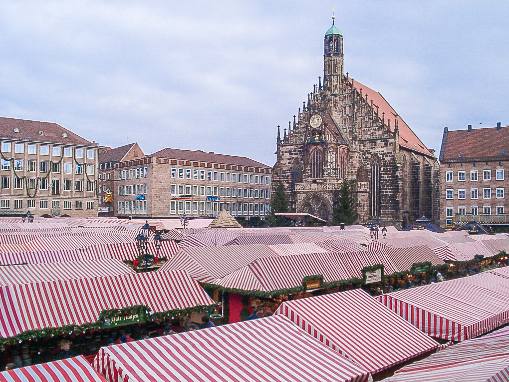 Nürnberger Christkindlesmarkt mit Frauenkirche